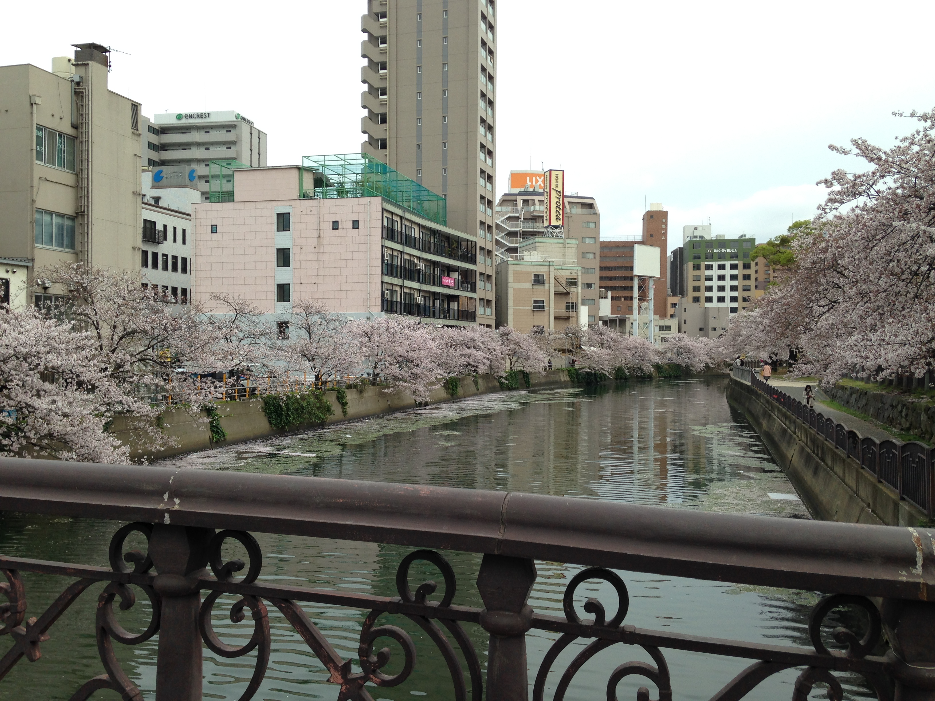 福博であい橋より望む薬院新川(上流側)とサクラ